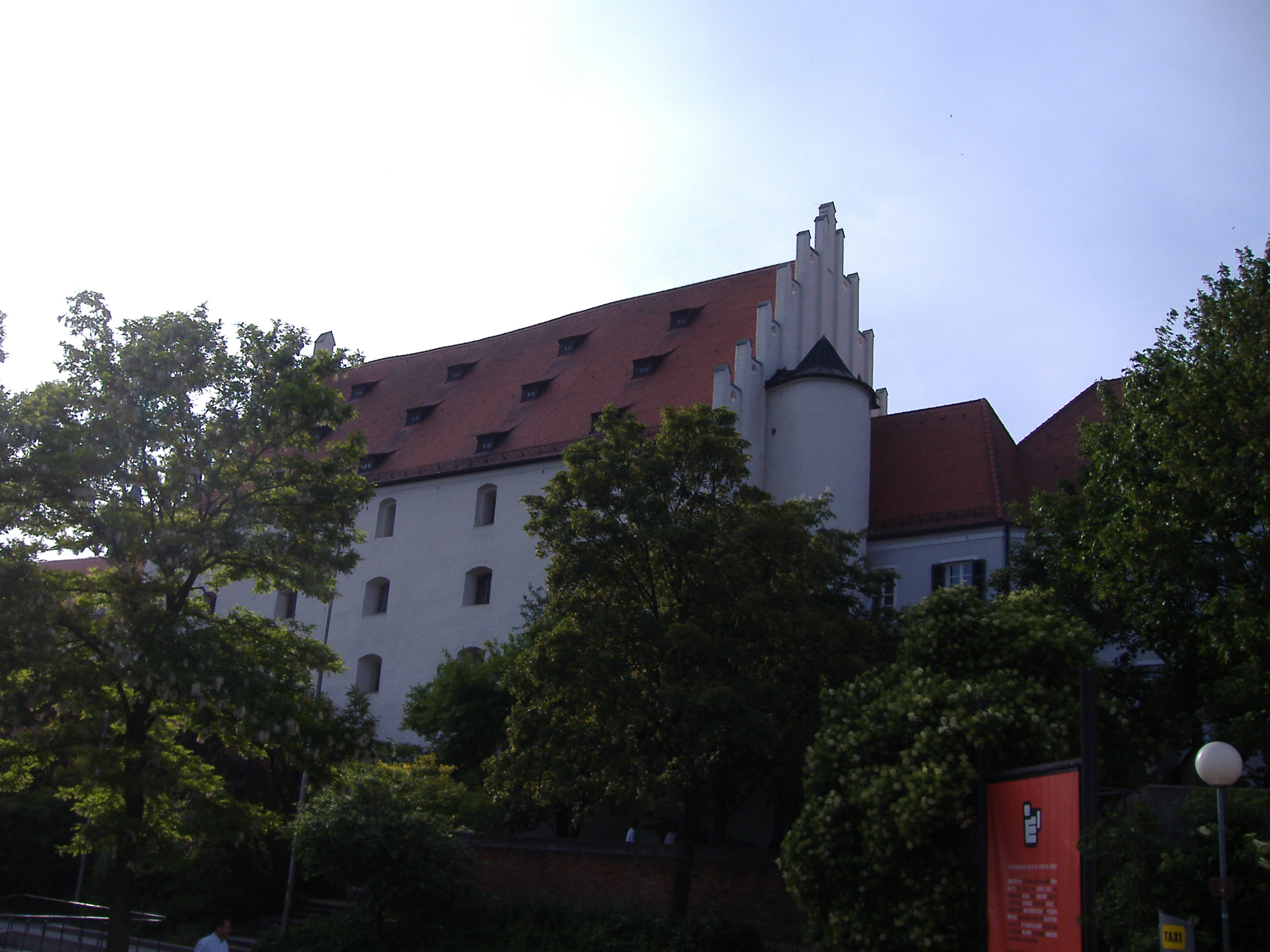 Herzogskasten (Altes Schloss) mit Turm